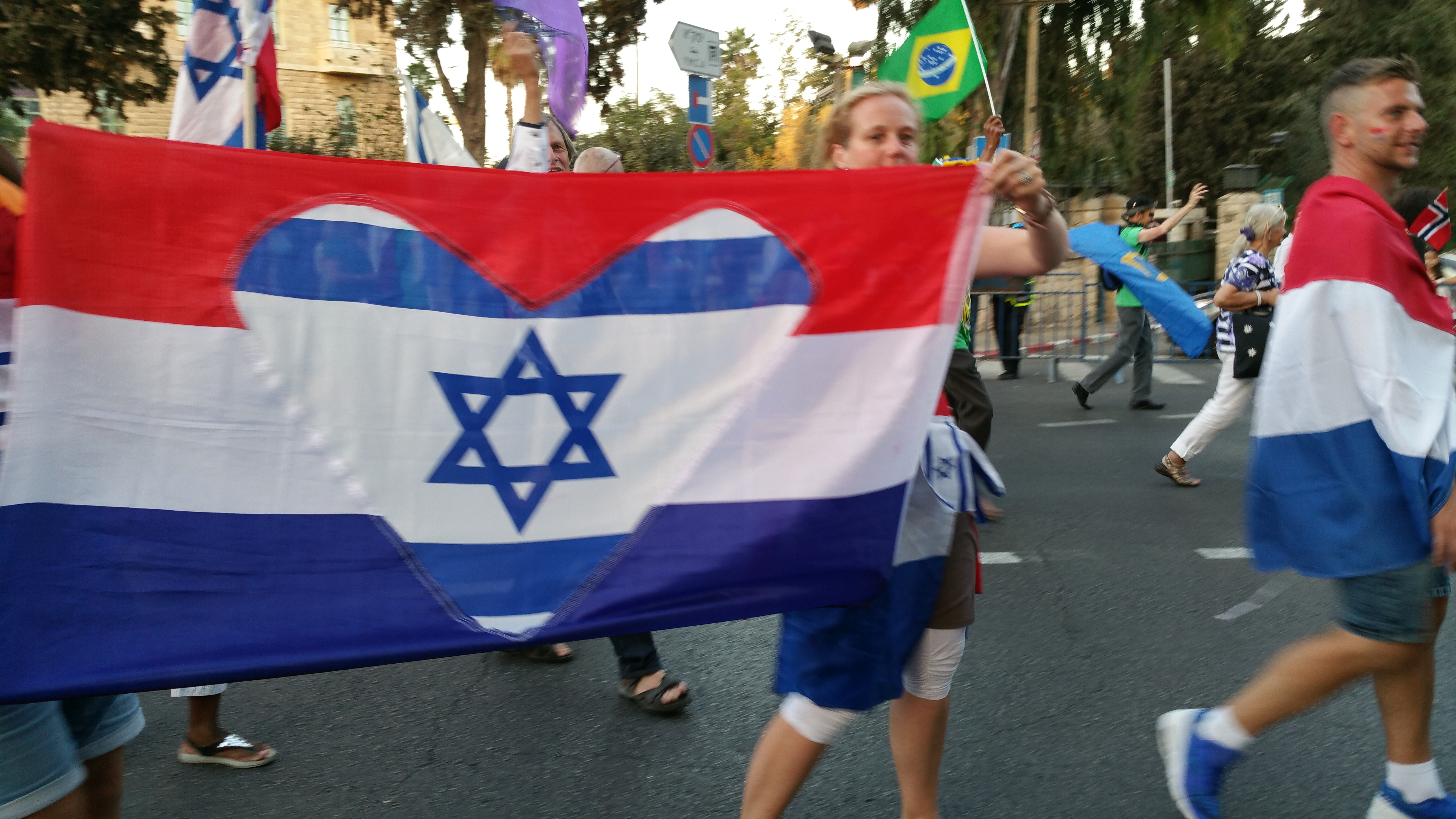 Holland delegation jerusalem march 2016